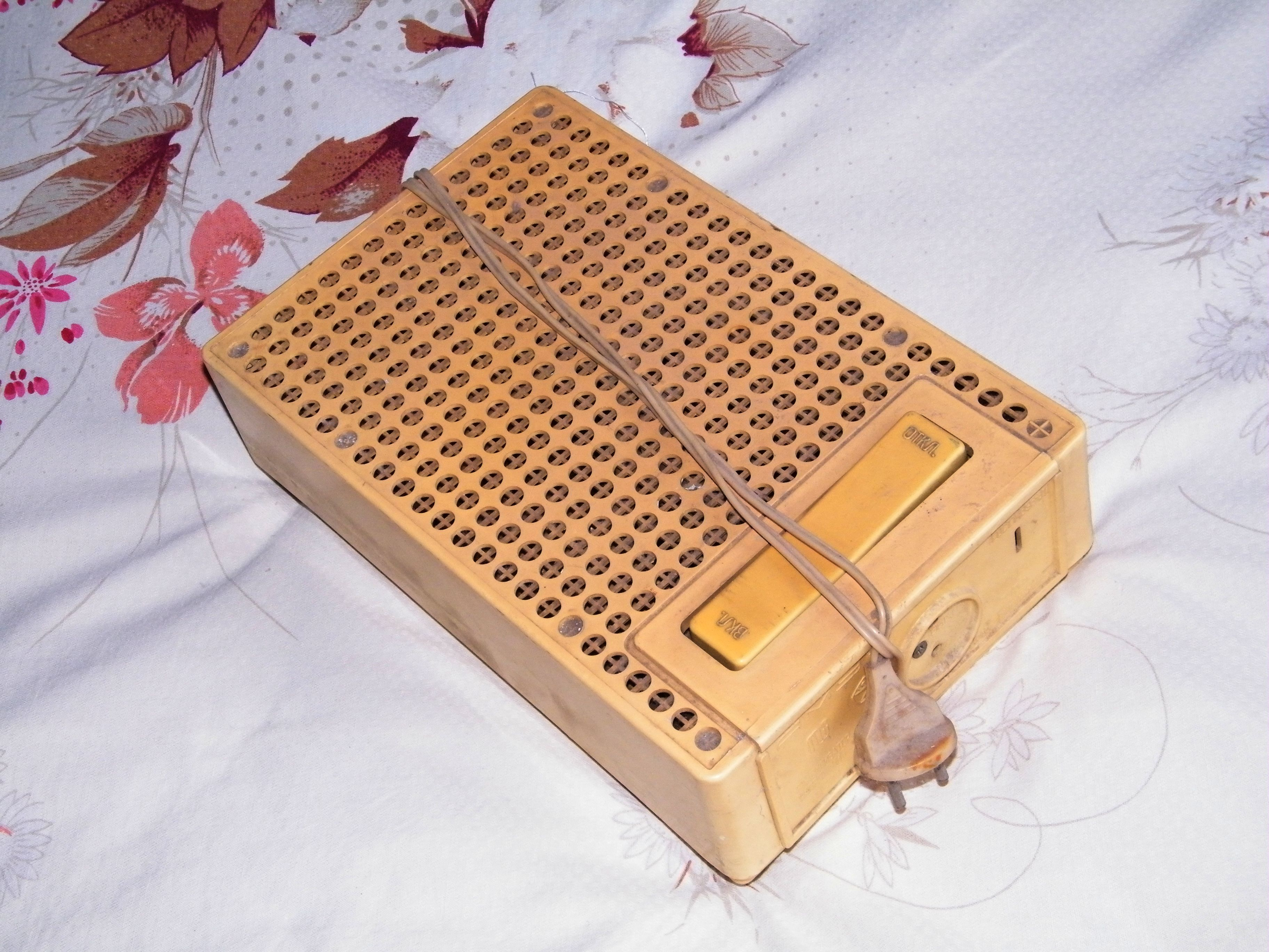 Стабилизатор «Укранина 2» переменного напряжения для ламповых цветных телевизоров. СССР, начало 1980-х годов.